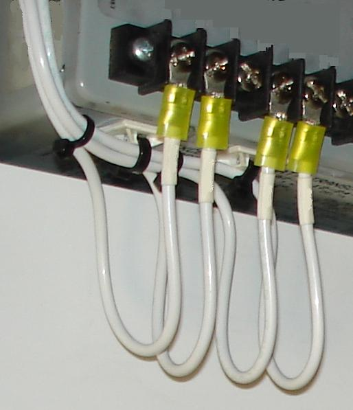 Coca_Cables antes llegar a Clemas